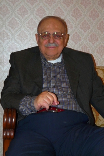 Hasan Kasaei Iranian musician